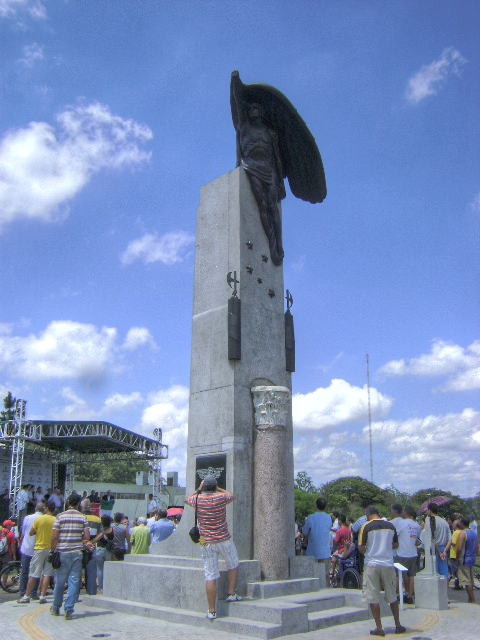 Monumento aos "Heróis da travessia do Atlântico"